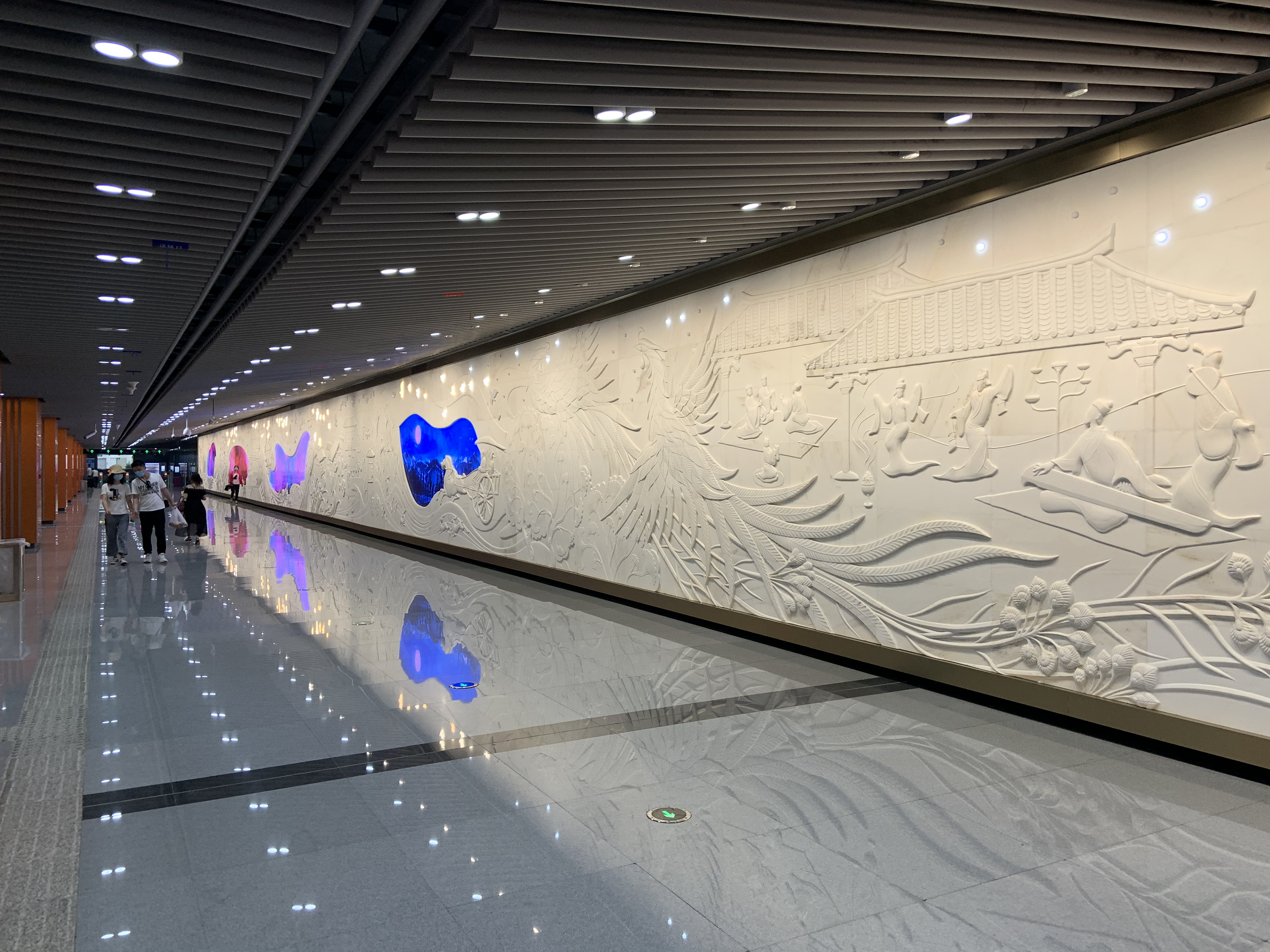 成都地铁5号线抚琴站艺术墙